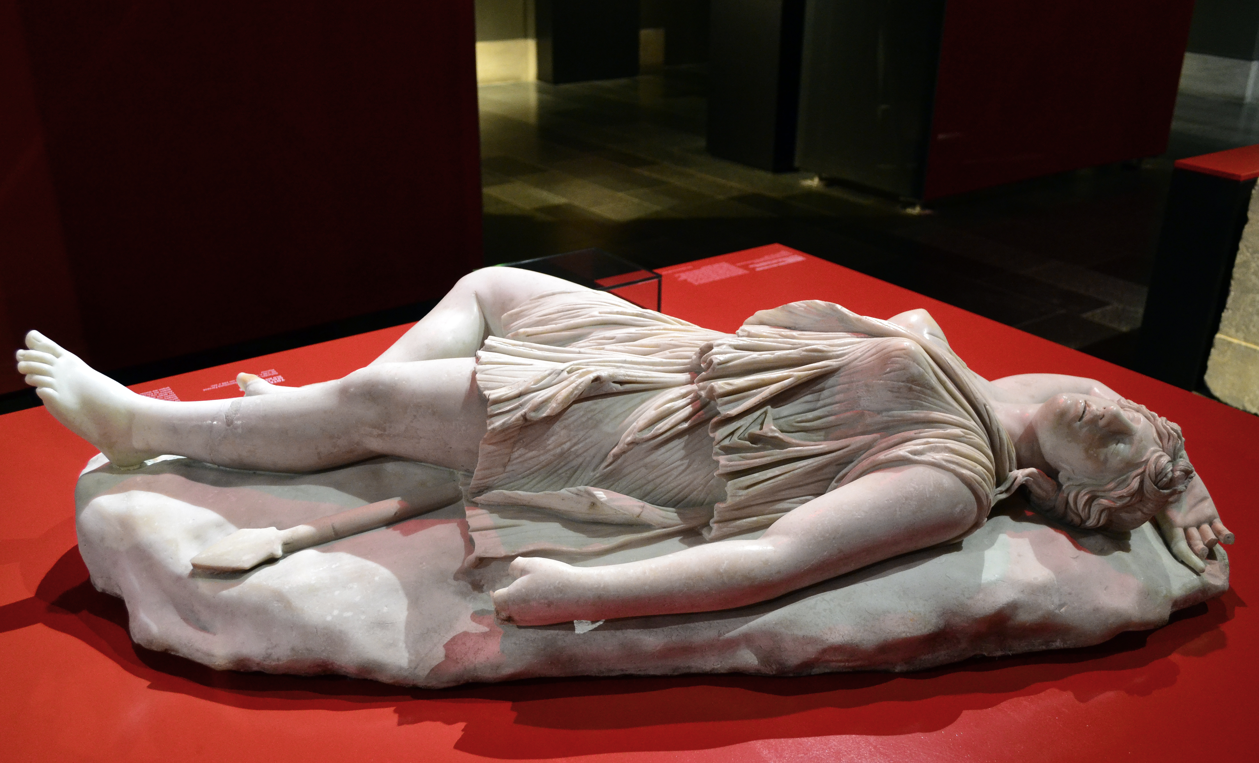 Römische Kopie (trajanisch-hadrianisch) einer hellenistischen Skulptur (um 150 v.Chr.). Mamor. FO: Rom, 1514. Leihgabe des Museo Archeologico Nazionale, Napoli.